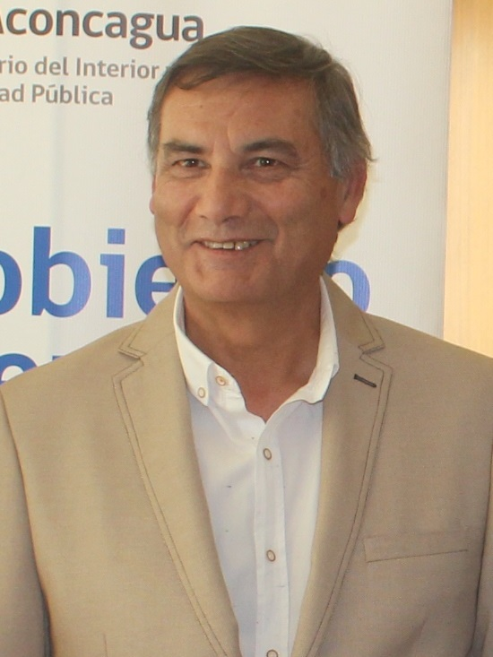 Autoridades regionales y provinciales de San Felipe, distinguieron a los dos estudiantes de dicha comuna que fueron beneficiados con el programa.